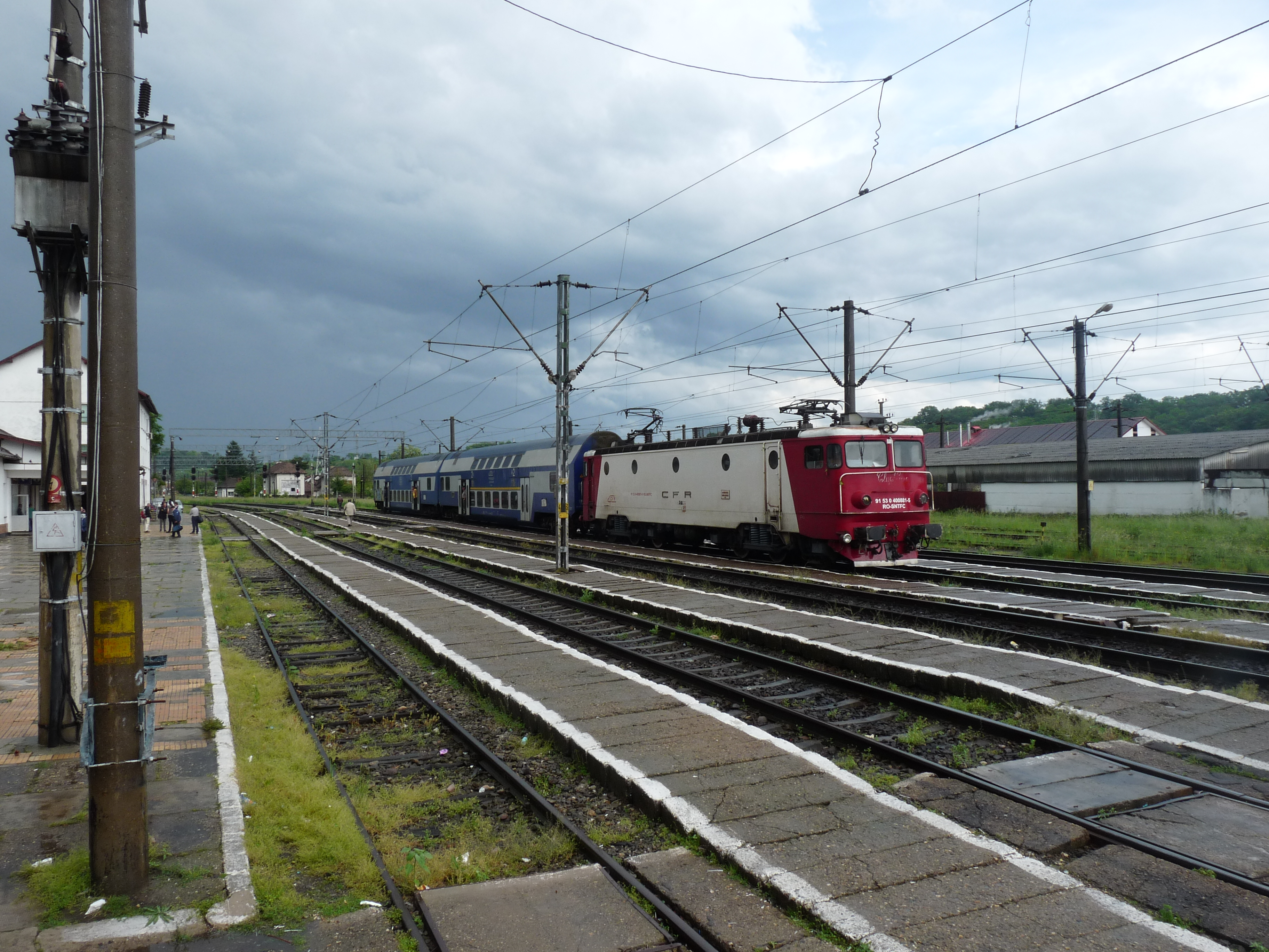 Het station Beclean pe Someş